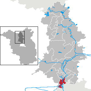 Hennigsdorf in Brandenburg (Country) - District Oberhavel